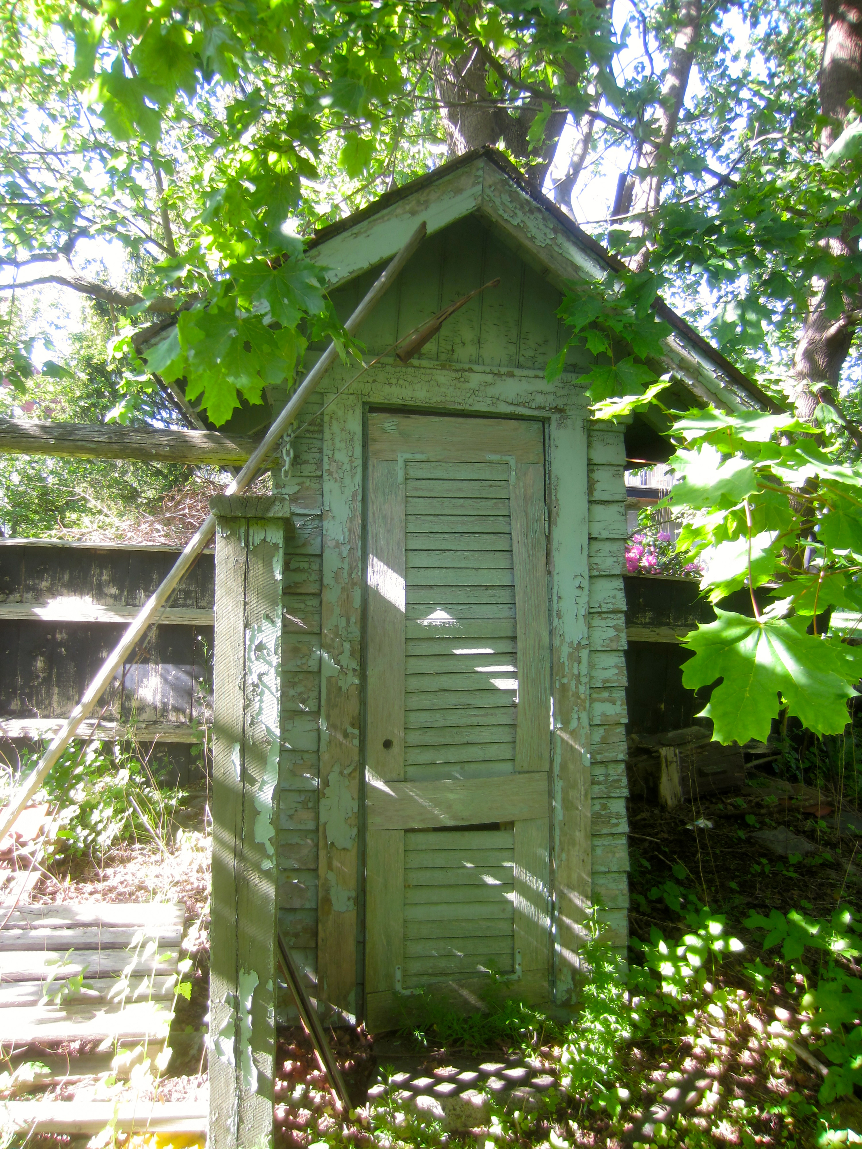 Avträdet, Villa Soltorpet. Byggnadsminne sedan 26 september 1983.